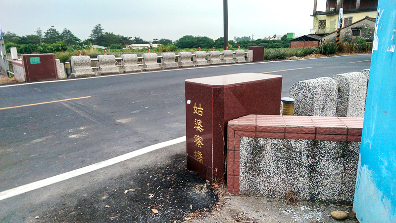 中文（台灣）: 姑婆寮橋 重建橋梁後才命的名，因要紀念早期的地名所取。